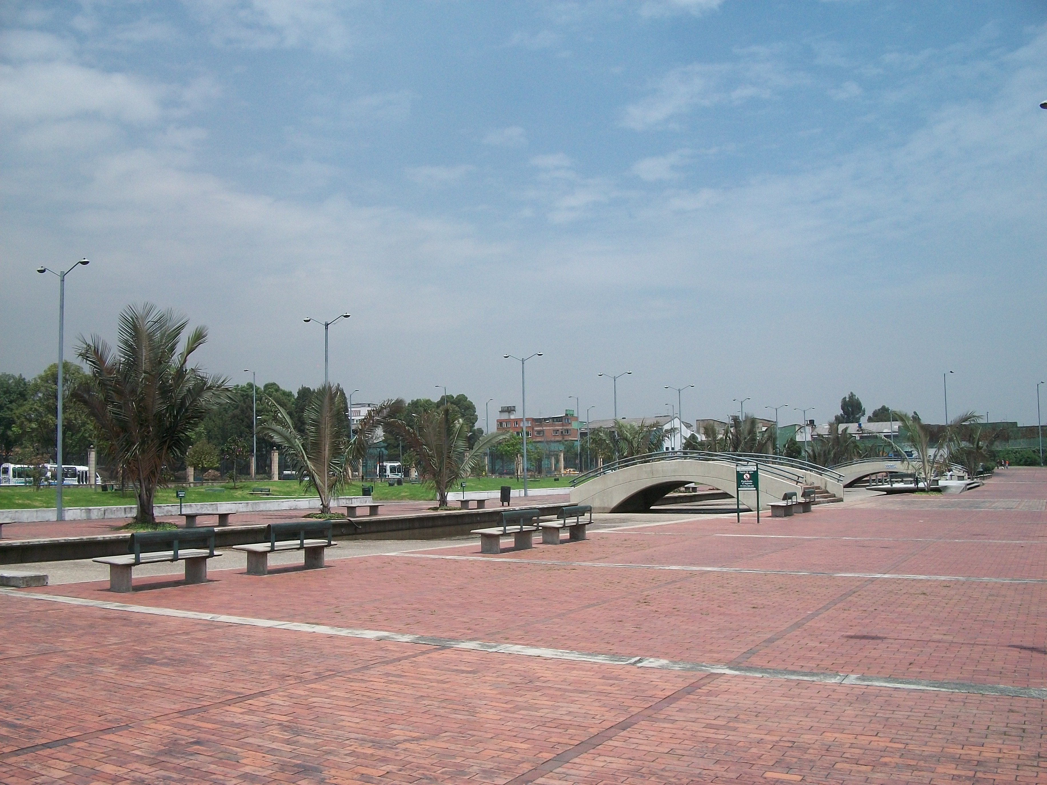 Fuente central de el parque El Renacimiento, en Bogotá.